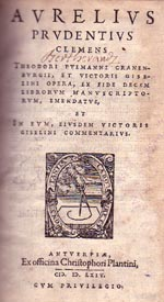 Prudence (Aurelius Prudentius Clemens) - Page de garde d'une édition ancienne de ses œuvres